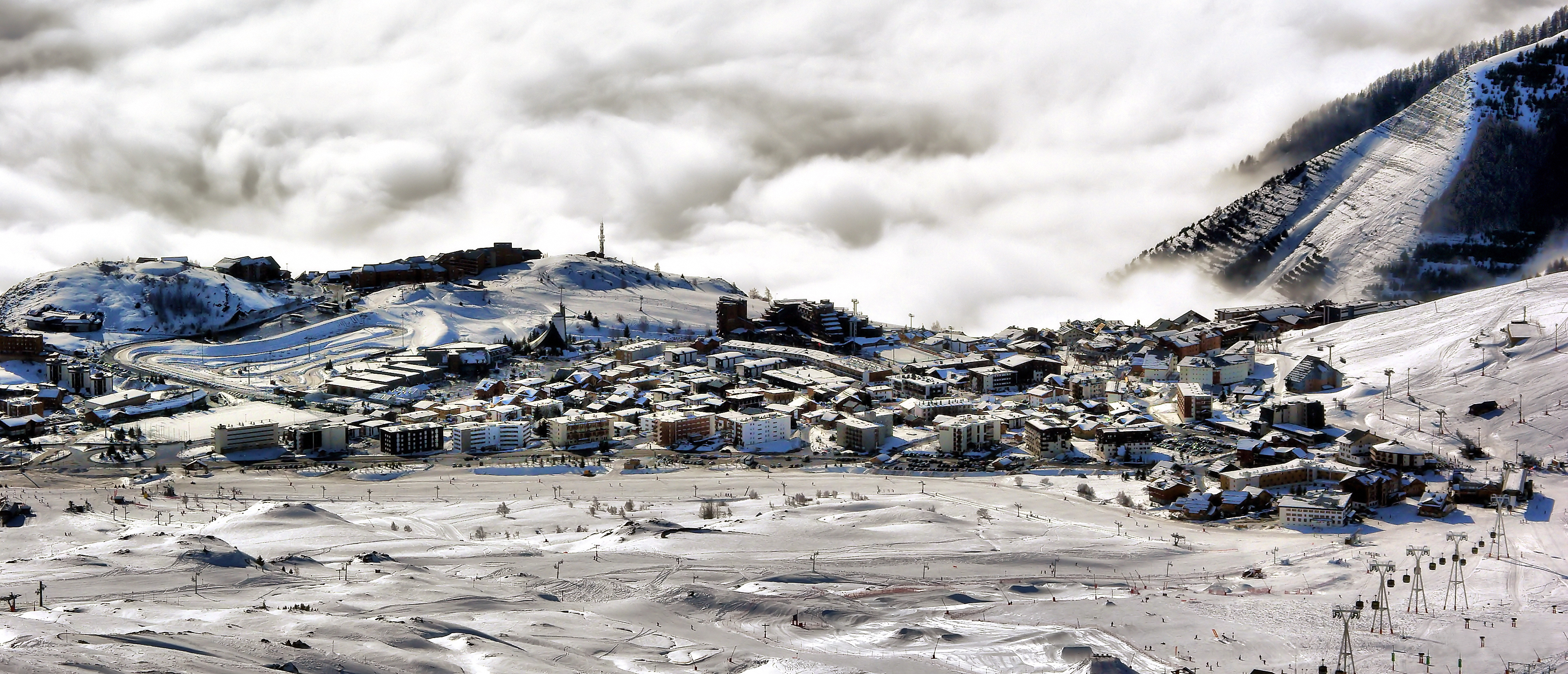 L'Alpe d'Huez vue générale